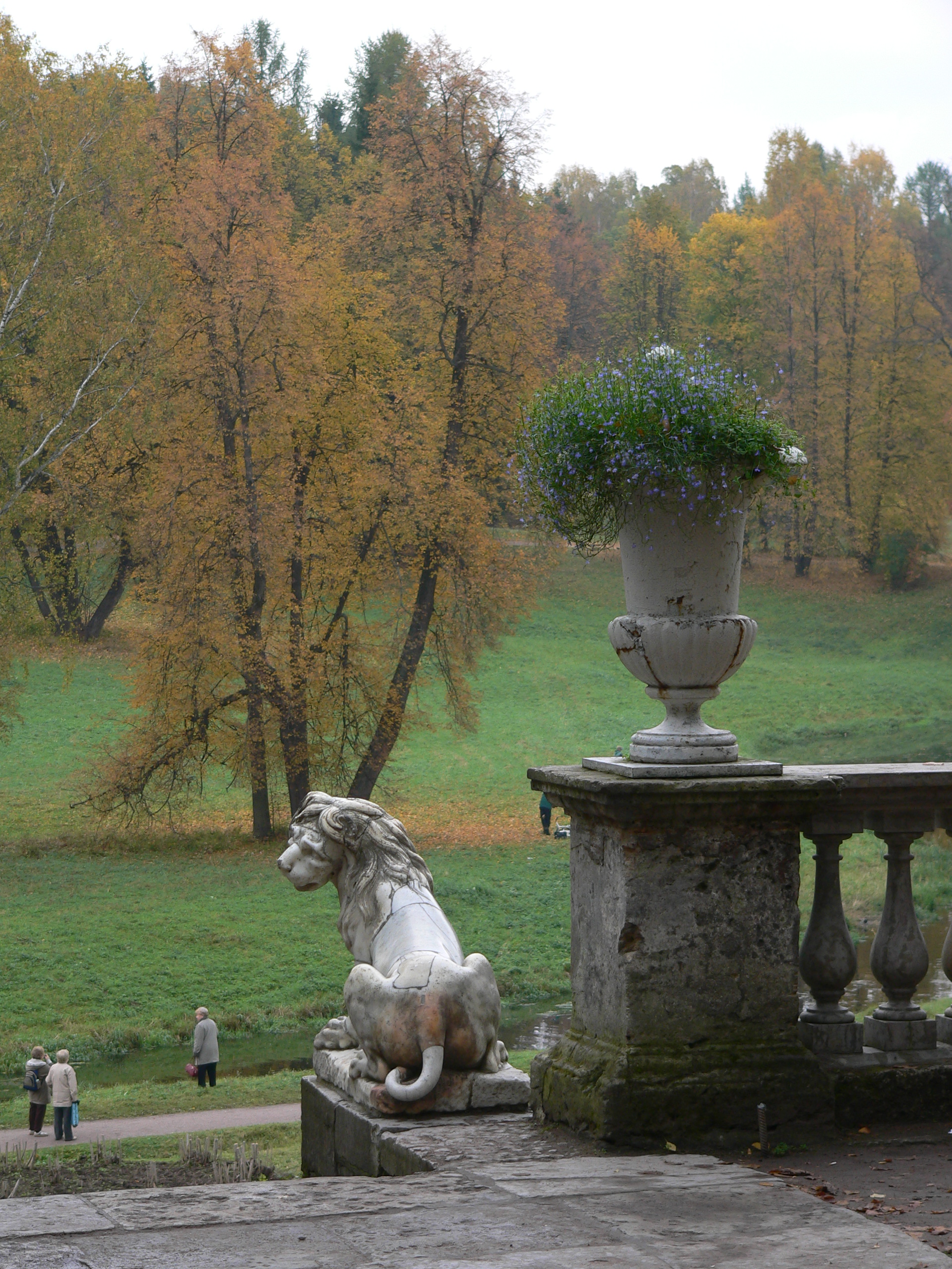 Мраморный лев у дворцовой лестницы в Павловском парке.